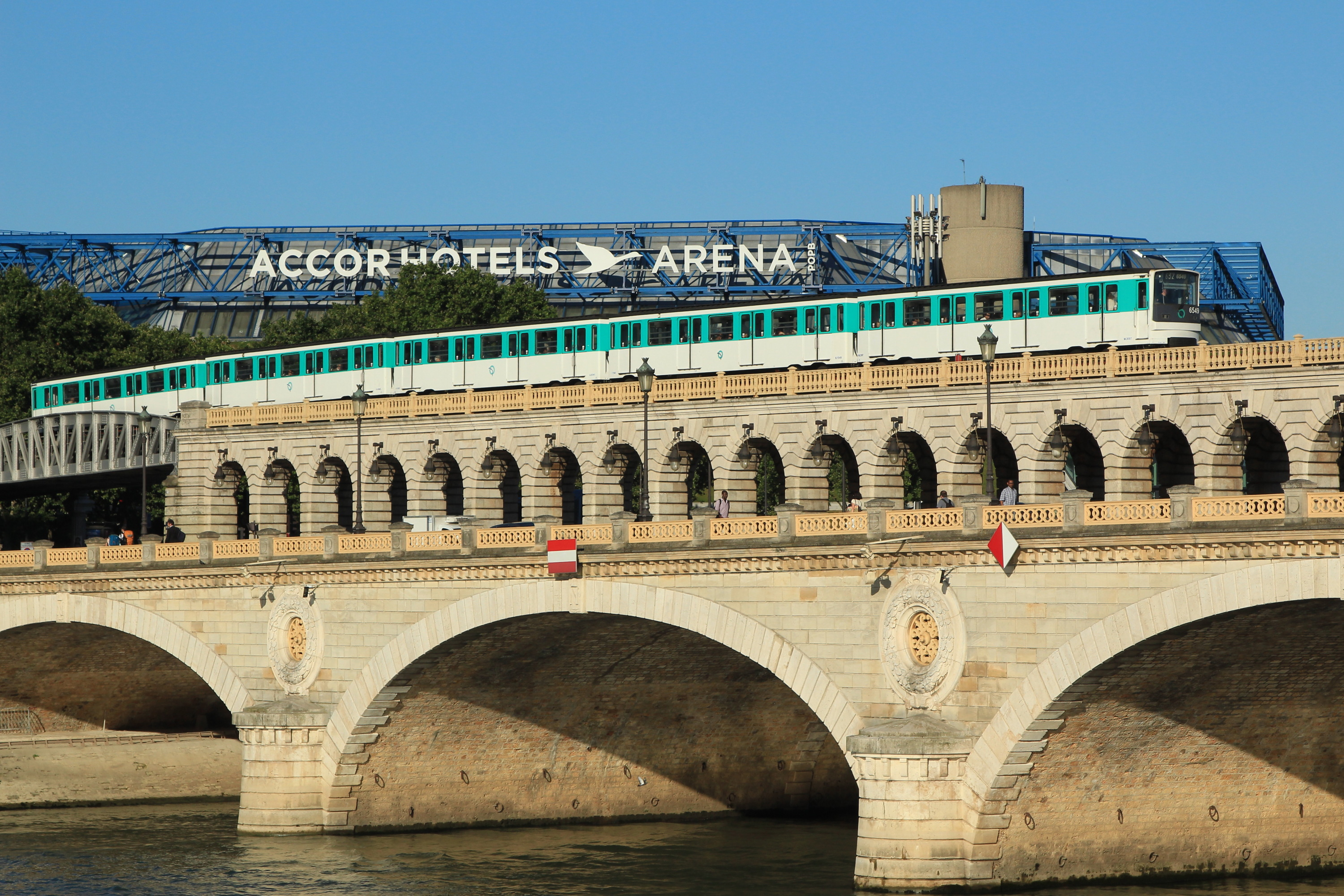 Un métro de type MP 73 (n° 6549) sur le viaduc de Bercy de la ligne 6 du métro parisien.